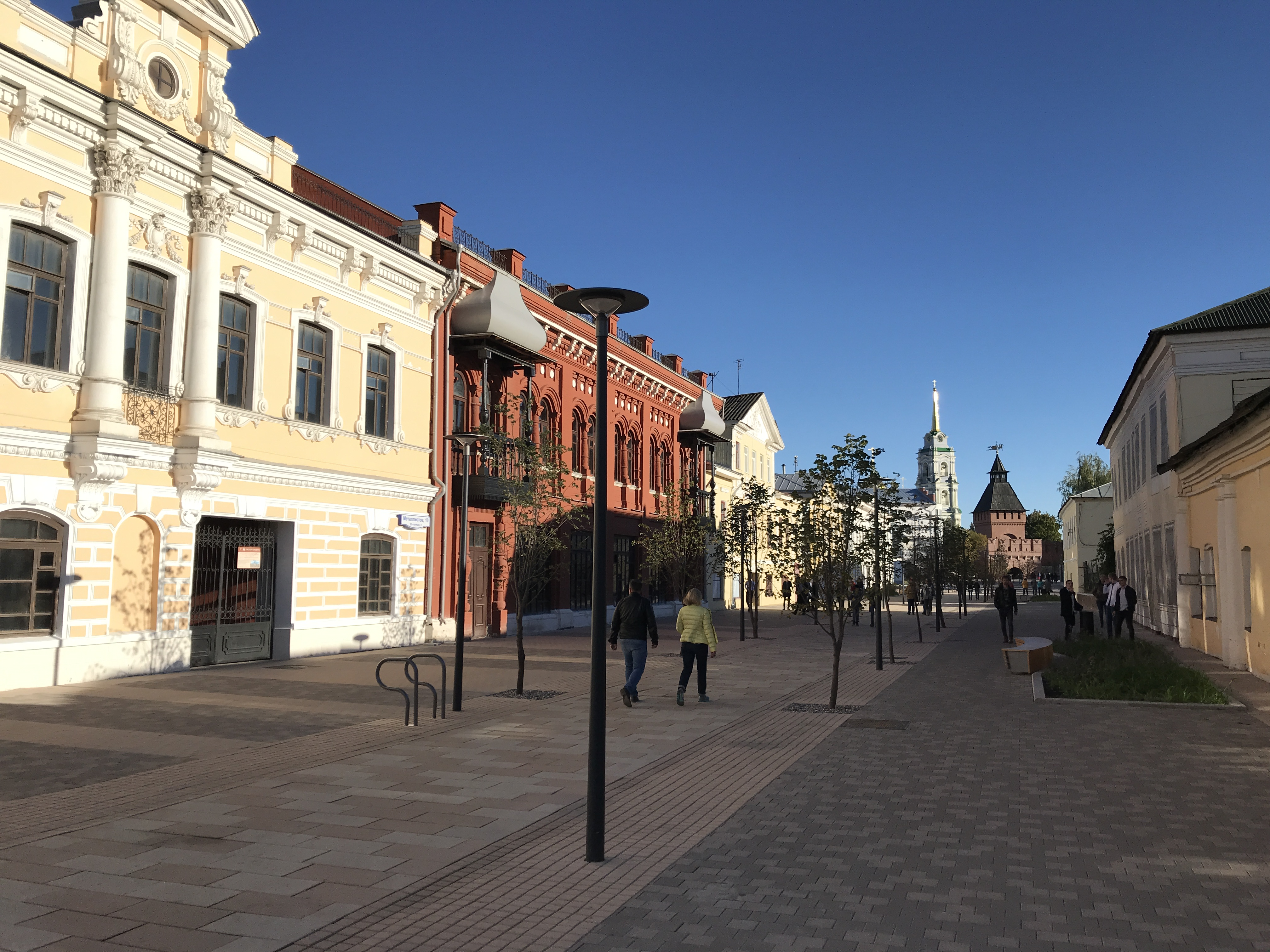 Metallistov Street (Tula)